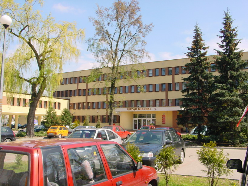 Budynek Urzędu Miasta w Wołominie Autor:Maciej Florczak Florekf